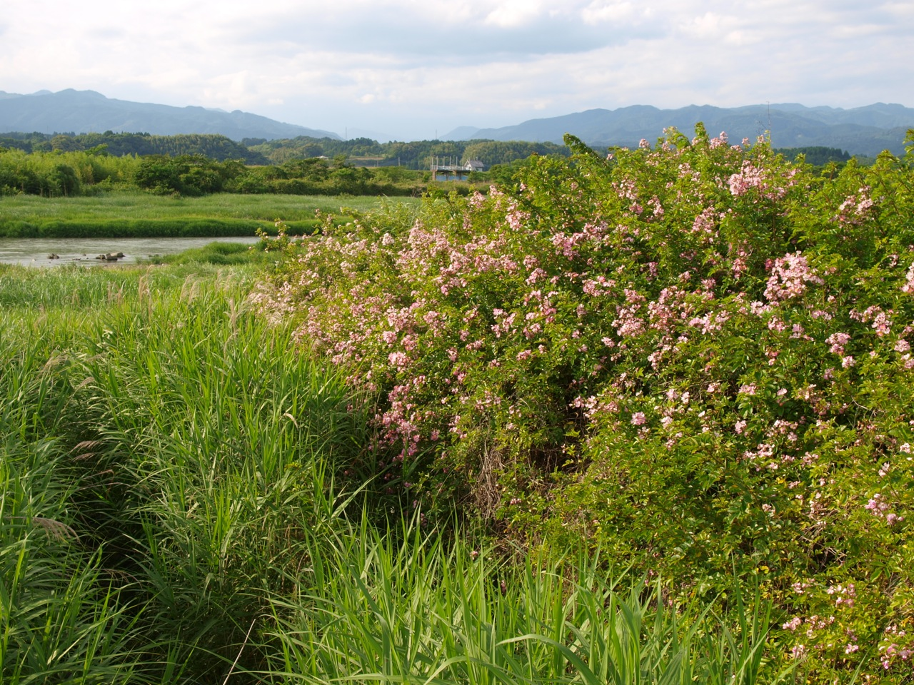 球磨川のツクシイバラ Rosa multiflora adenochaeta of Kumagawa River.